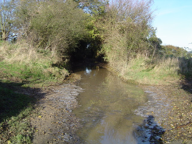 River Ash and Violets Lane, Furneux Pelham